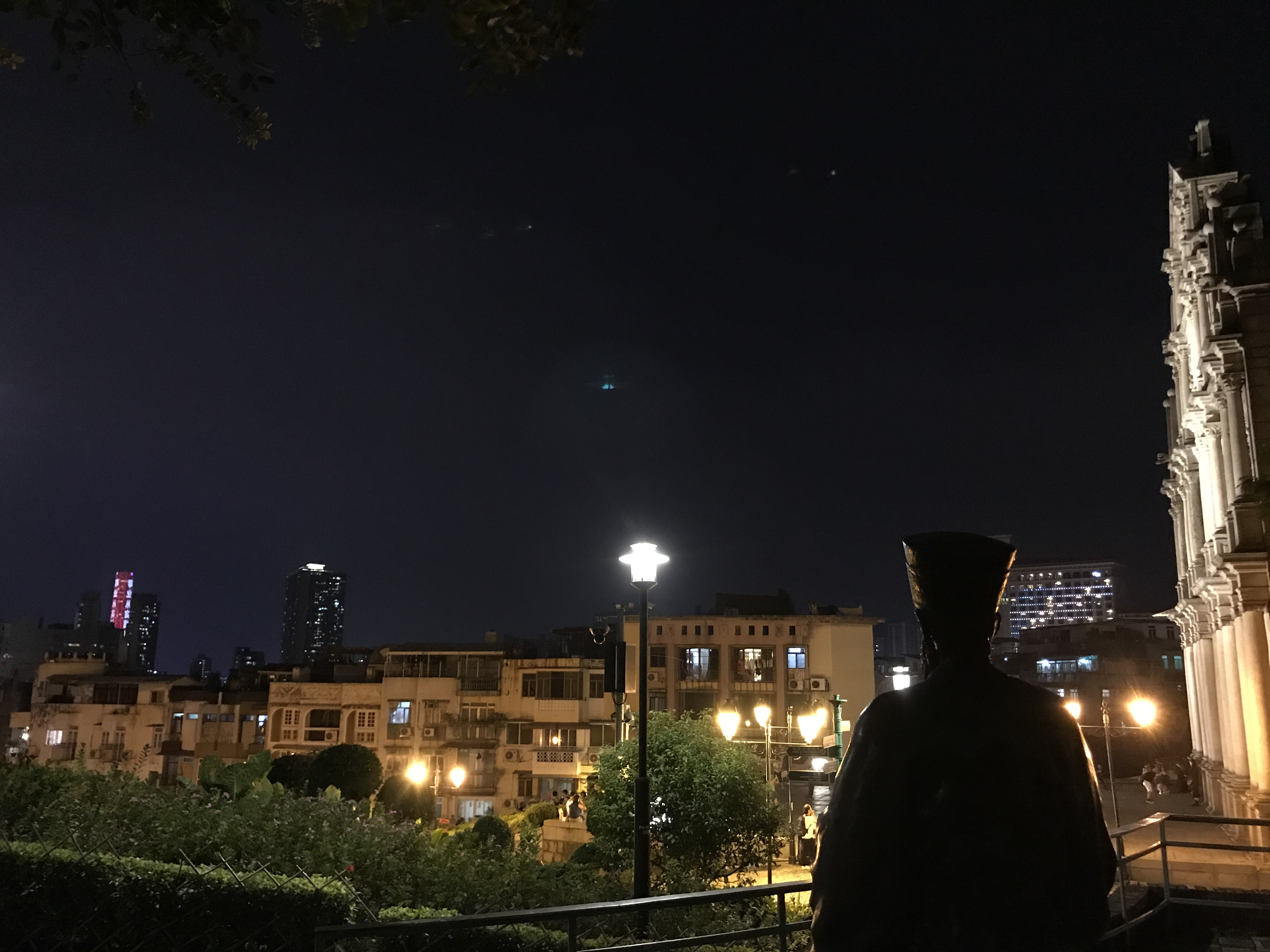 中文（台灣）: 大三巴牌坊上原有的內港景觀被現代樓屋遮擋，右下為利瑪竇像。